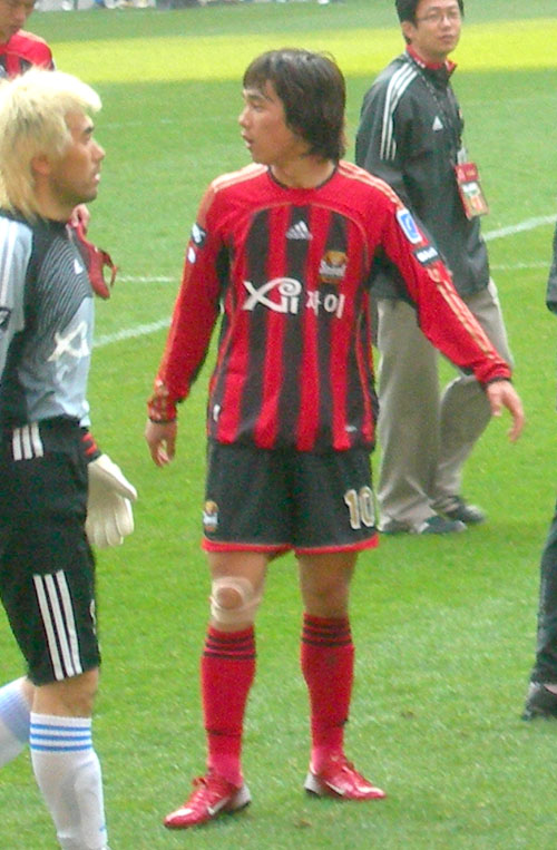 박주영의 경기 직후 모습. 서울월드컵경기장에서 열린 서울 대 수원 경기. 사진 왼쪽은 골키퍼 김병지.